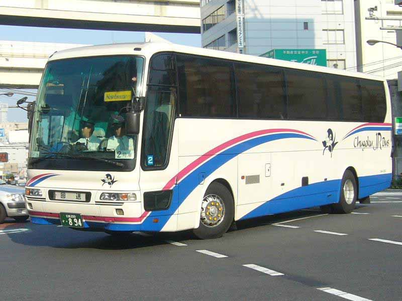 登録番号 広島200か・894 中国ジェイアールバス(Chugoku JR bus)広島支店所属 三菱ふそう・エアロクィーン KC-MS822P 当初は広島支店所属 旧々登録番号 広島200か・452 後に島根支店に転籍 旧登録番号 島根200か・168 島根時代の画像